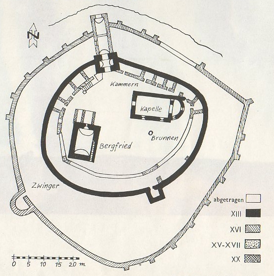 Planul fortificatiei din Calnic.